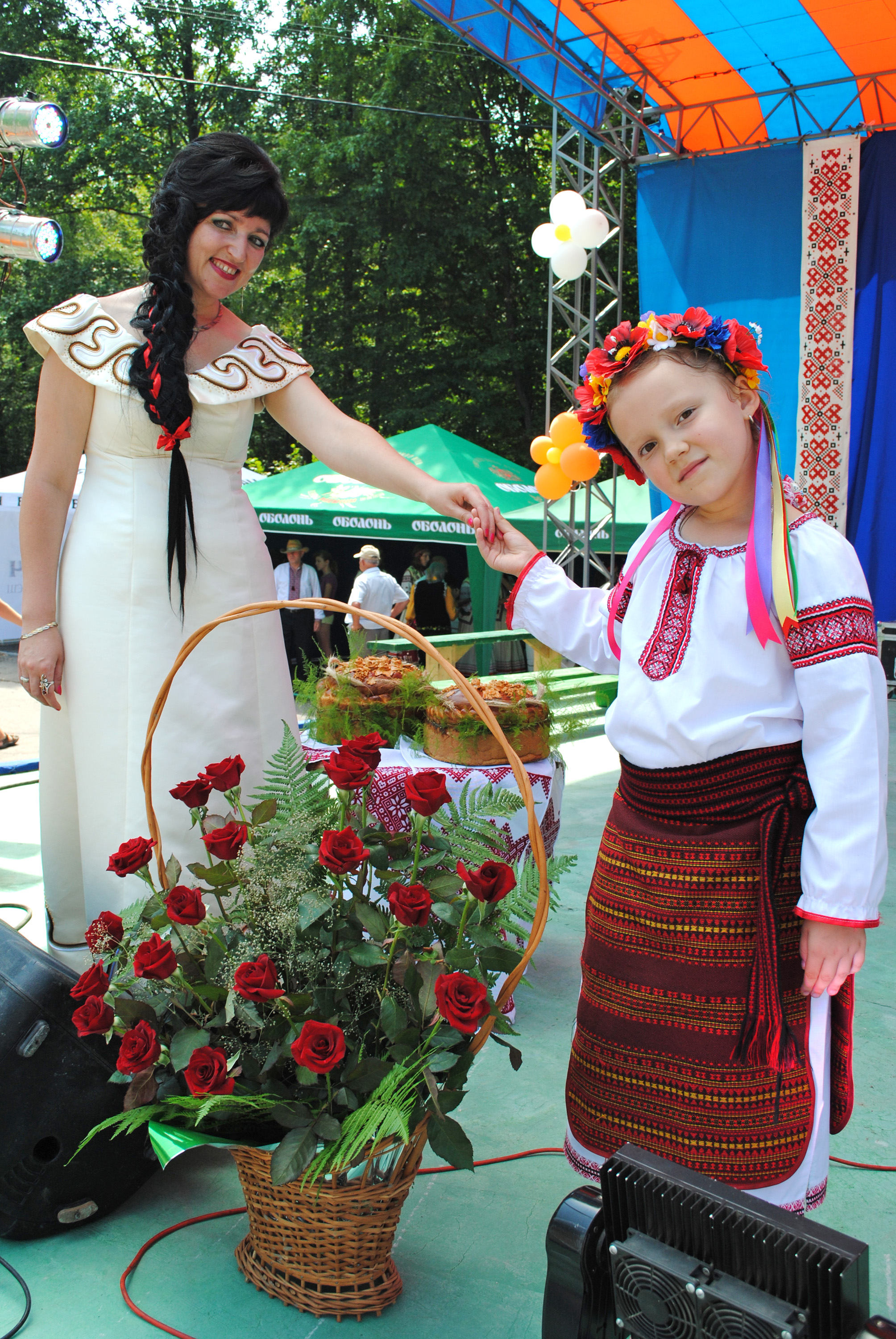 Українська бандуристка, член Національної спілки кобза­рів України Надія Михайлівна Кулик із донечкою Софійкою.